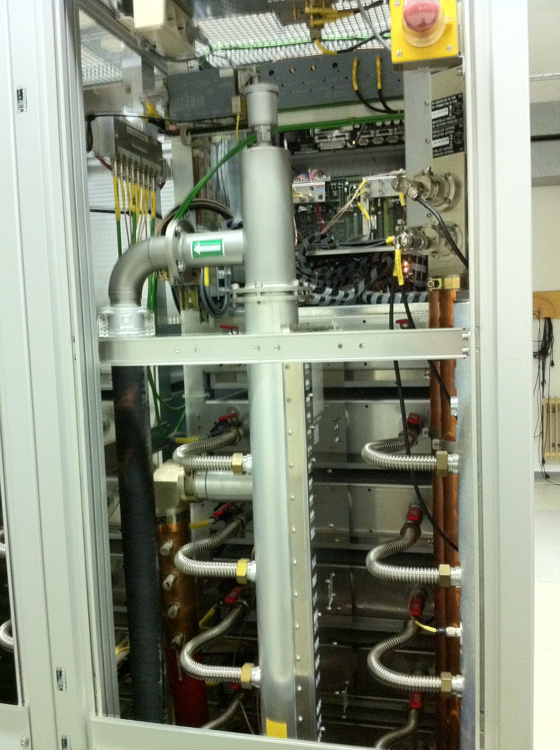 Rückansicht der digitalen Sendeendstufen des Radiosenders "Schleptruper Egge" mit Rohren für die Wasserkühlung